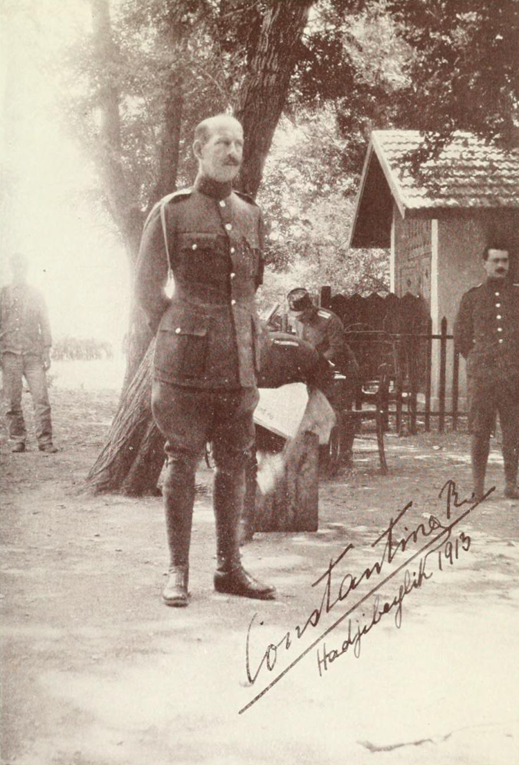 Constantino de Grecia en su cuartel general en Hayi Beilik en 1913.